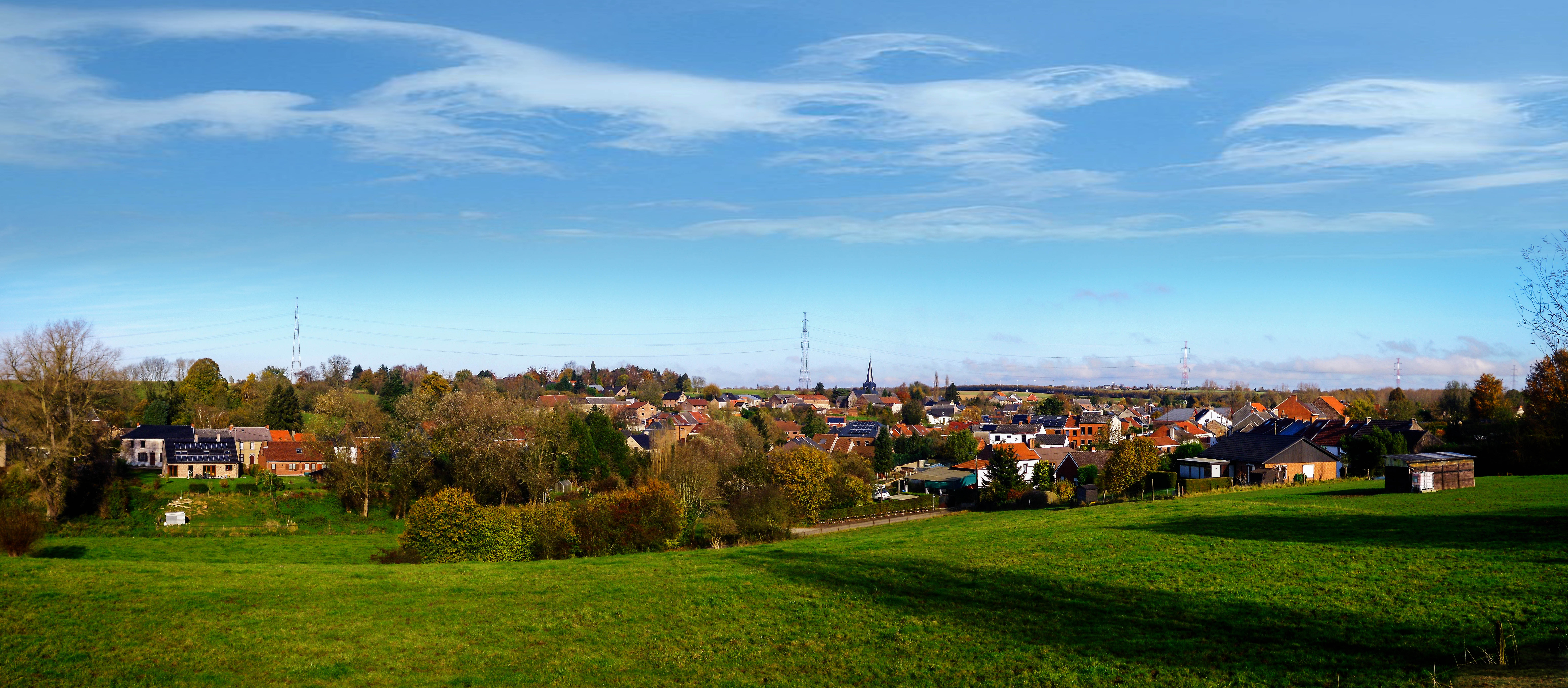 Panaorama de Viesville (2015)